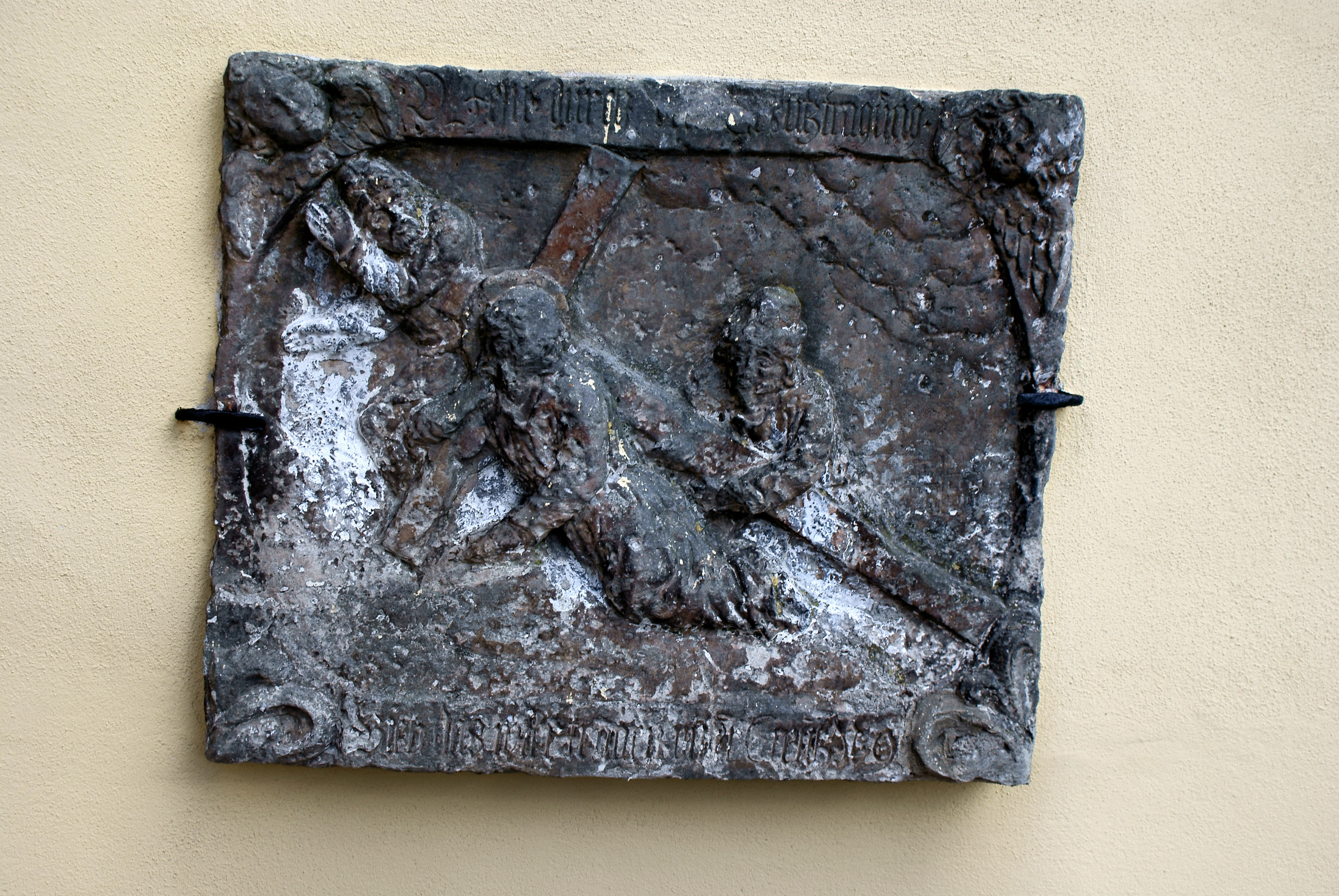 Grębocice - kościół parafialny św. Marcina (zabytek nr rejestr. A/1629/122)